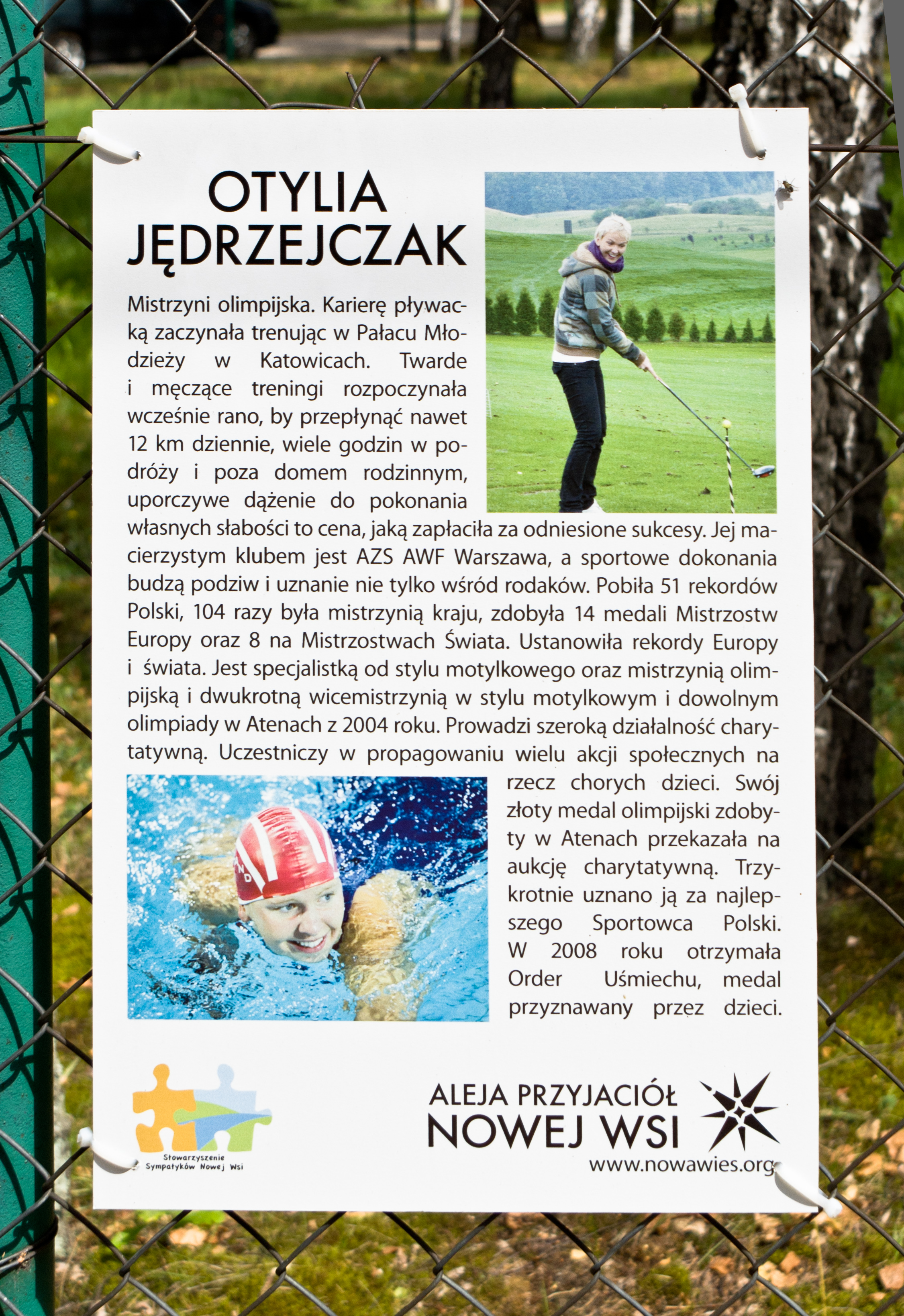 Tablica opisująca Otylię Jędrzejczak w Alei Przyjaciół Nowej Wsi (powiat legionowski).